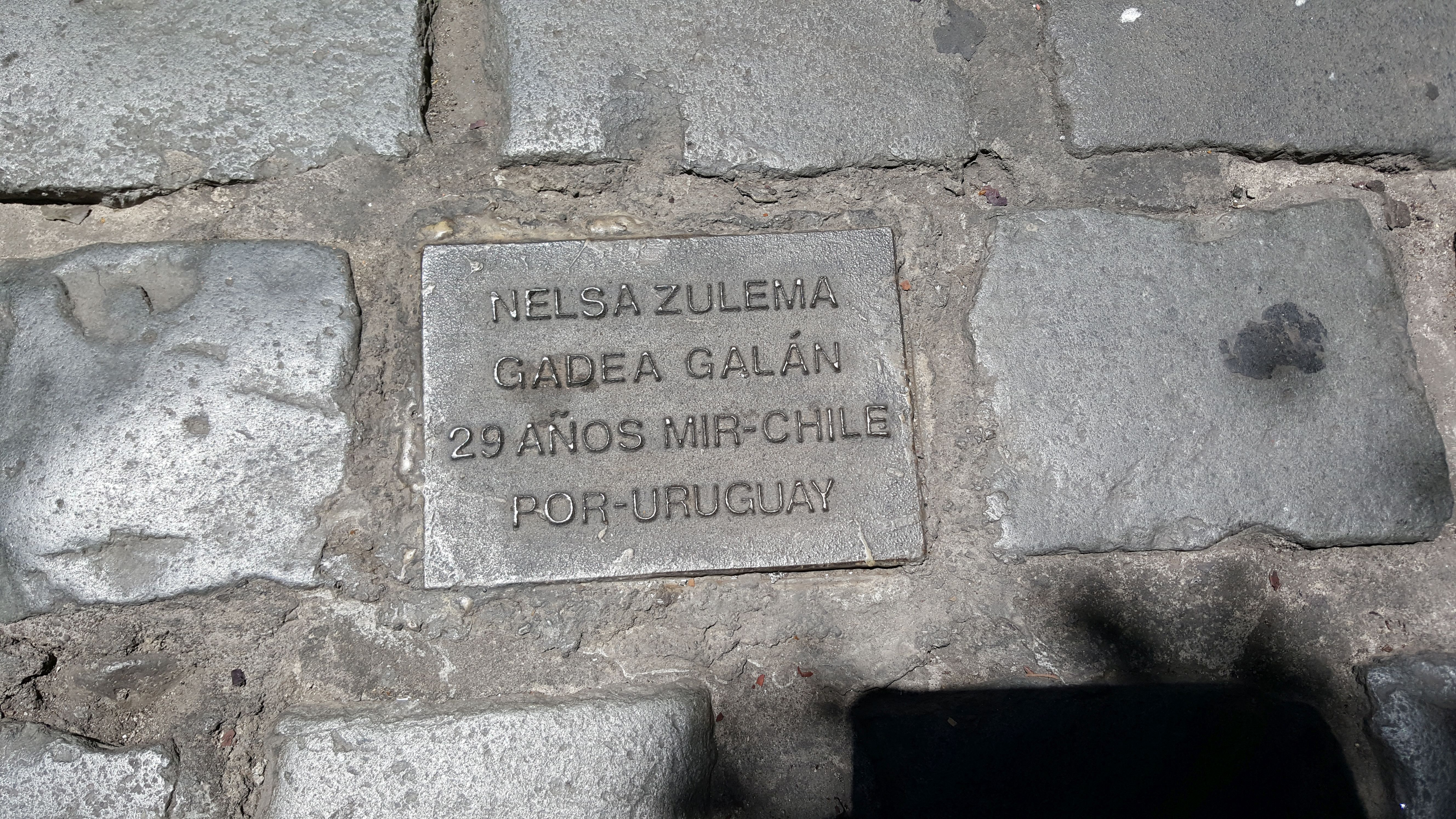 Placa recordatoria de Nelsa Gadea frente a Londres 38 en Santiago de Chile